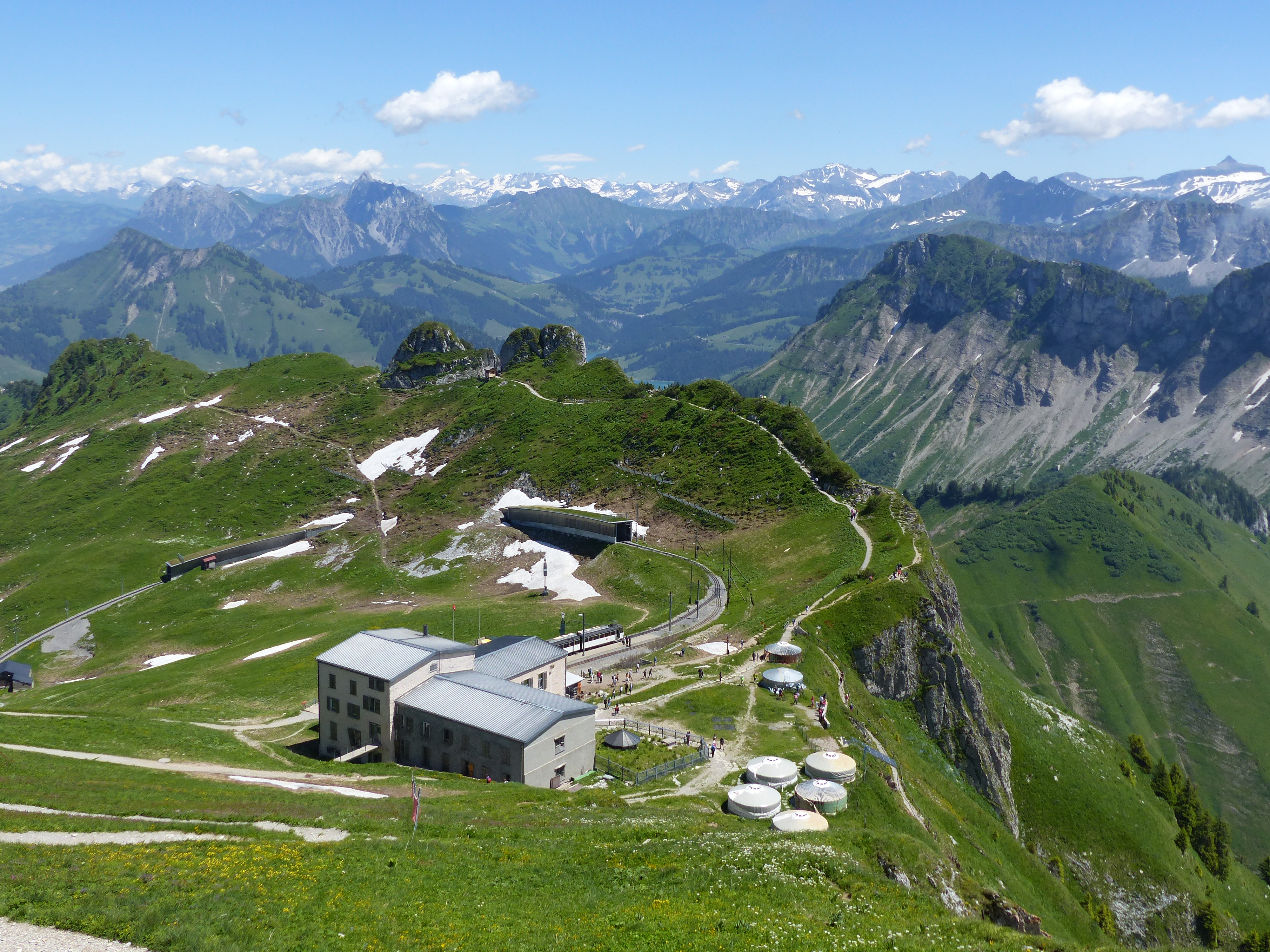 Bergstation Rochers de Naye